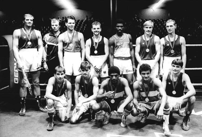 ADN-ZB Oberst 6.8.89 Berlin: 20. Internationales Boxturnier-Finale-Die 12 Turniersieger: (vorn von links) Jen Quast (Halbfliegen), Dieter Berg (Bantam-beide DDR), Eddy Suarez (Feder), Raul Gonzales (Fliegen -beide Kuba), Andreas Zülow (Leicht), (stehend von recht, vom Halbwelter bis Superschwer aufwärts) Andreas Otto, Siegfried Mehnert (beide DDR), Josa Luis Hernandez (Kuba), Sven Ottke (BRD), Henry Maske (DDR), Jewgeni Sudakow (UdSSR) und Maik Heydeck (DDR).